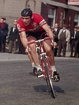 Willy Bocklant in een Belgische wielerkoers 1967